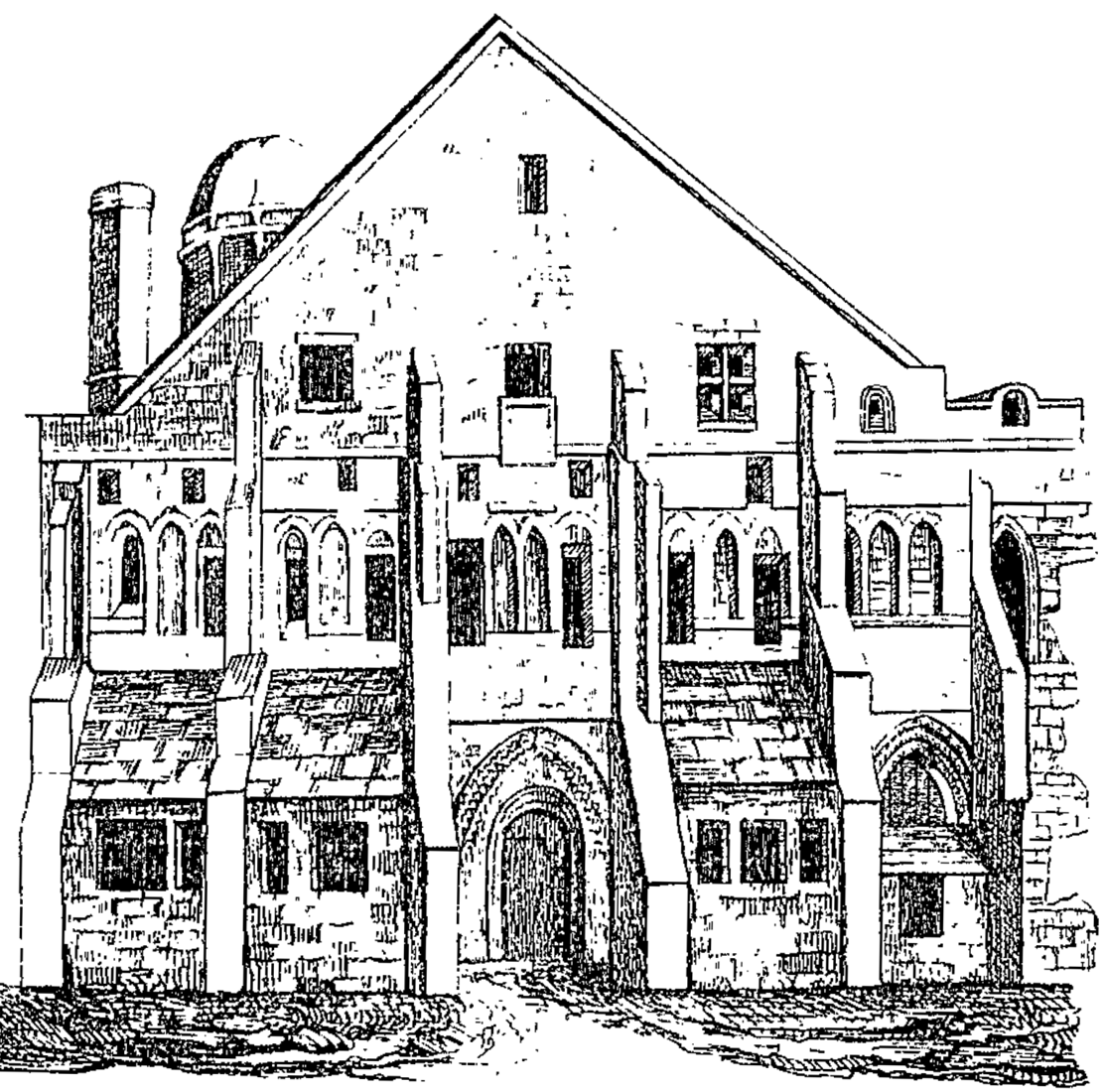 Façade principale de l'Hôtel-Dieu de Caen dessinée par Arcisse de Caumont avant sa démolition au début des années 1830.